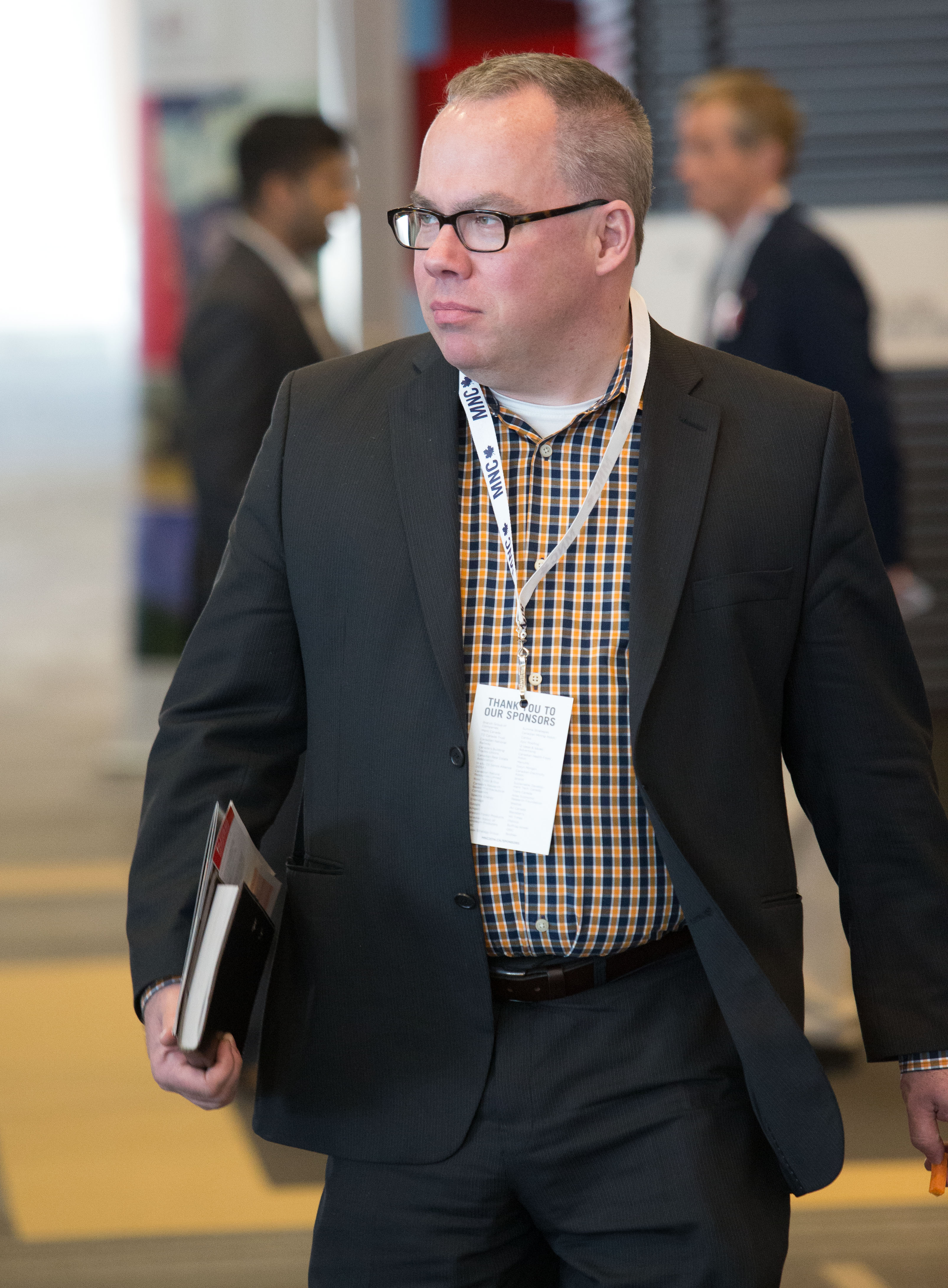 Canadian journalist Paul Wells